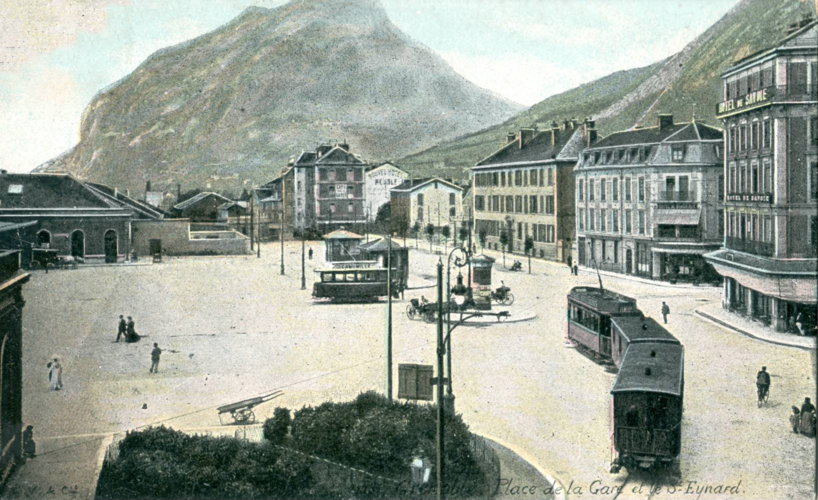 Carte postale ancienne éditée par LV & Cie (N° illisible) GRENOBLE : Place de la Gare et le Néron